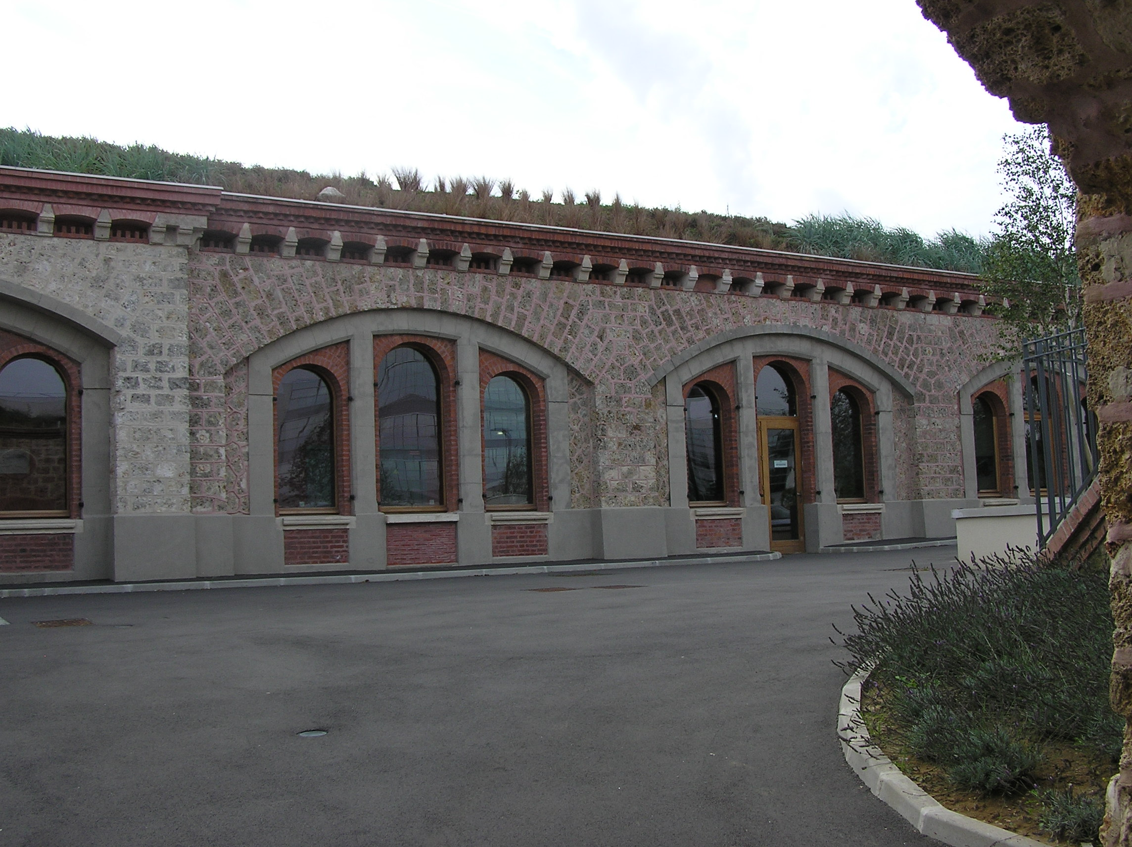 Batterie de Bouviers à Guyancourt : entrée des casemattes